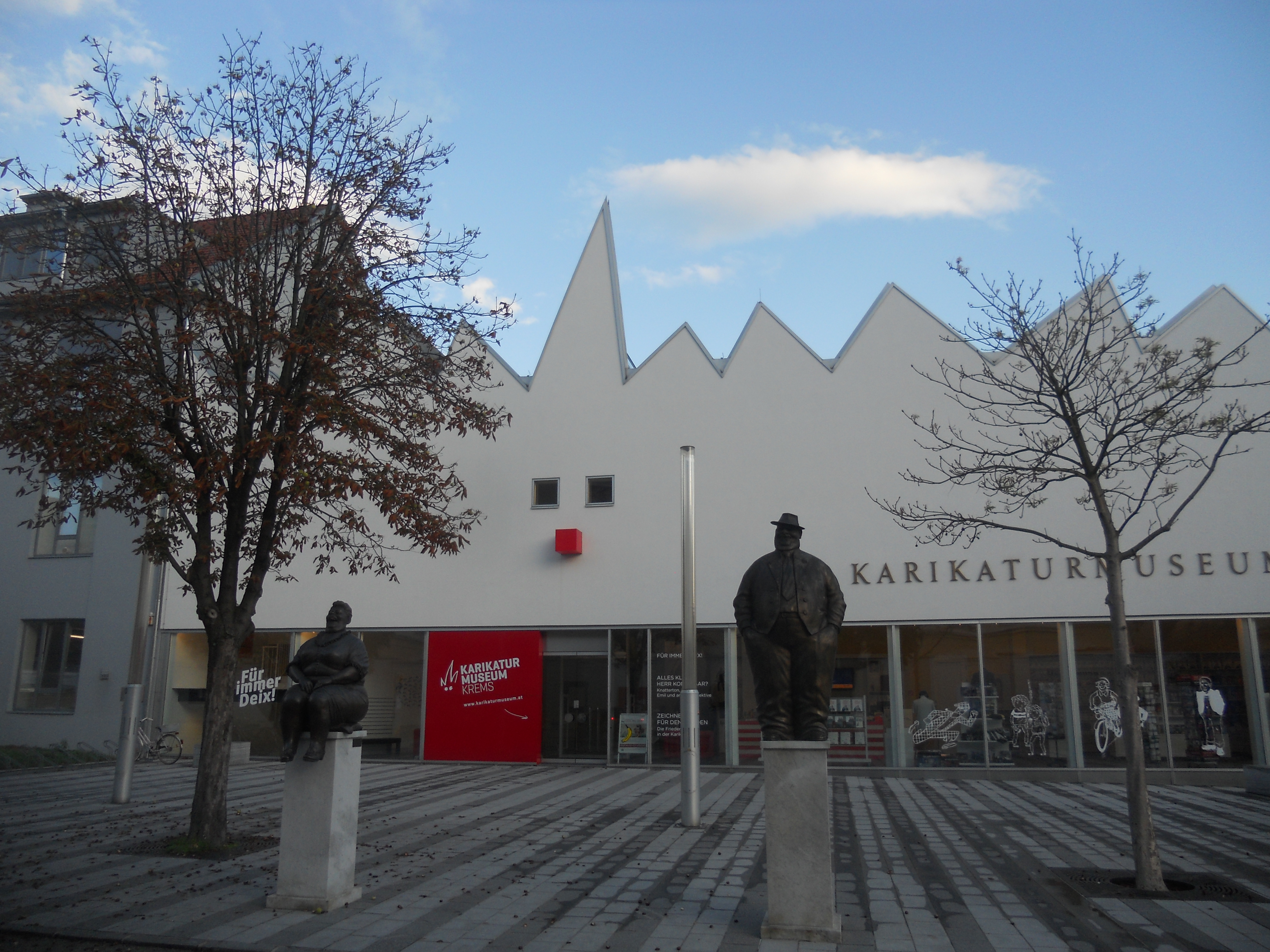 Das Karikaturmuseum in der Steiner Landstraße, Krems an der Donau